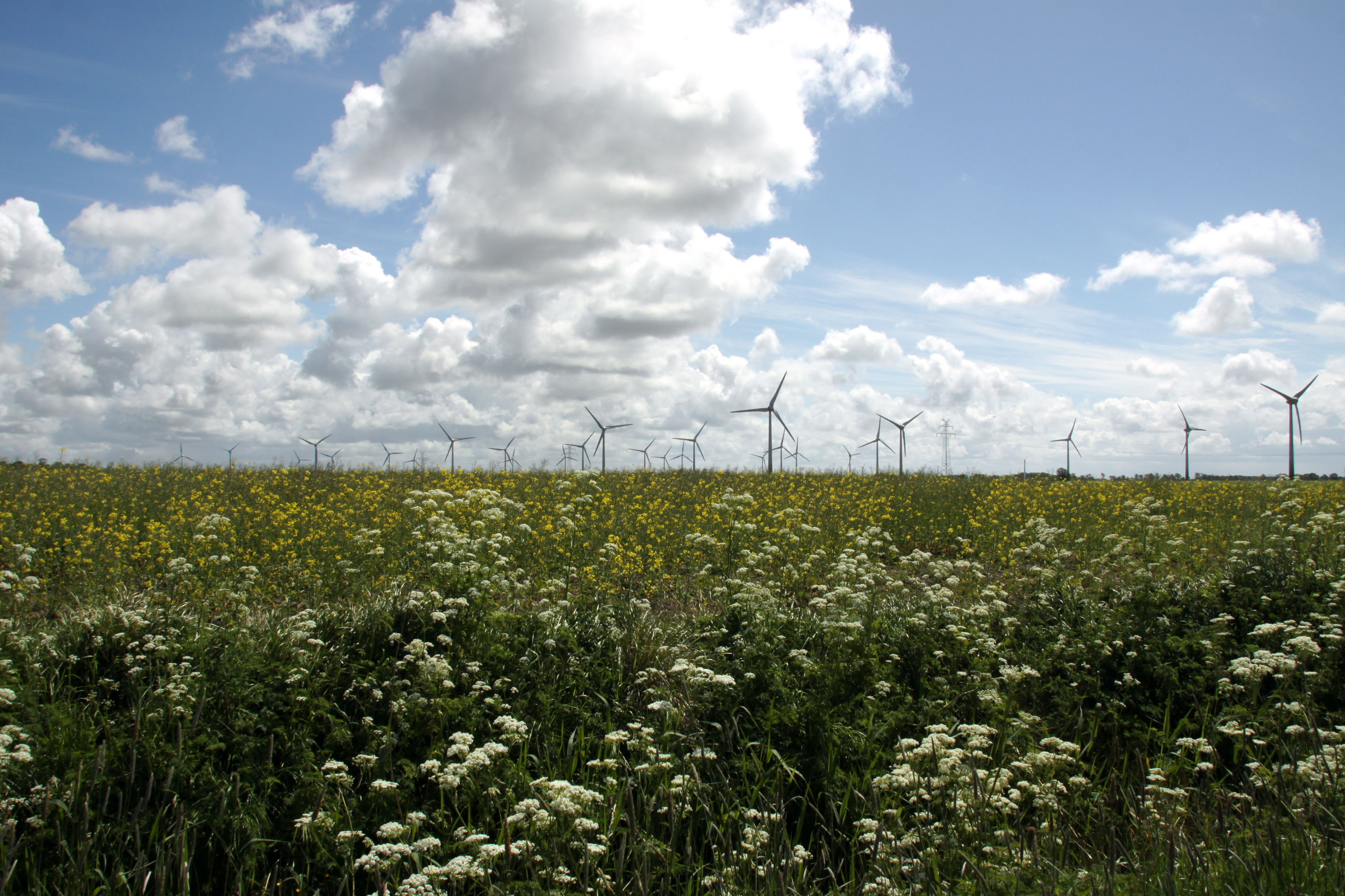 Windenergieanlagen in der Krummhörn